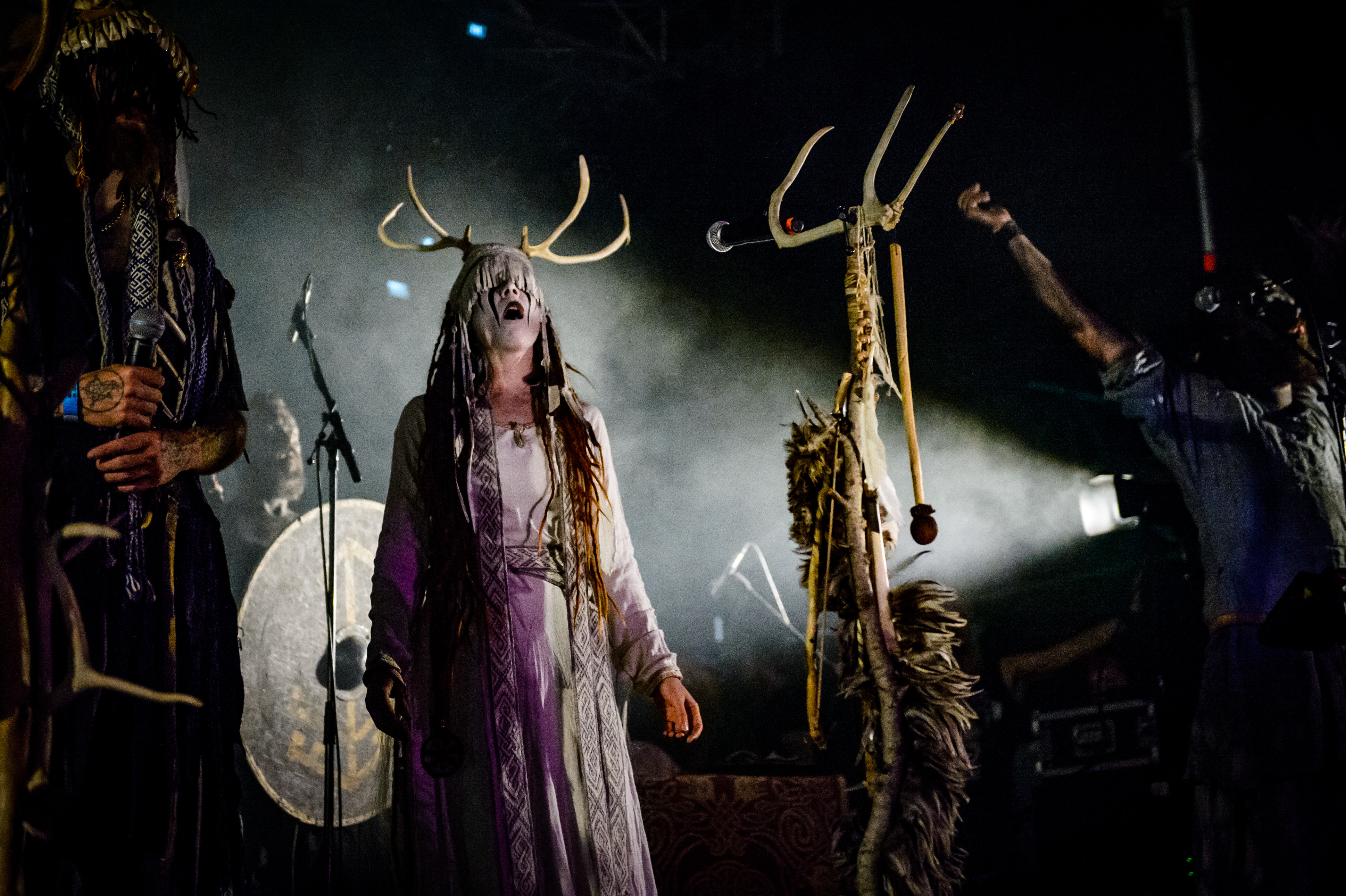 'Wacken Open Air 2018': 'Heilung'